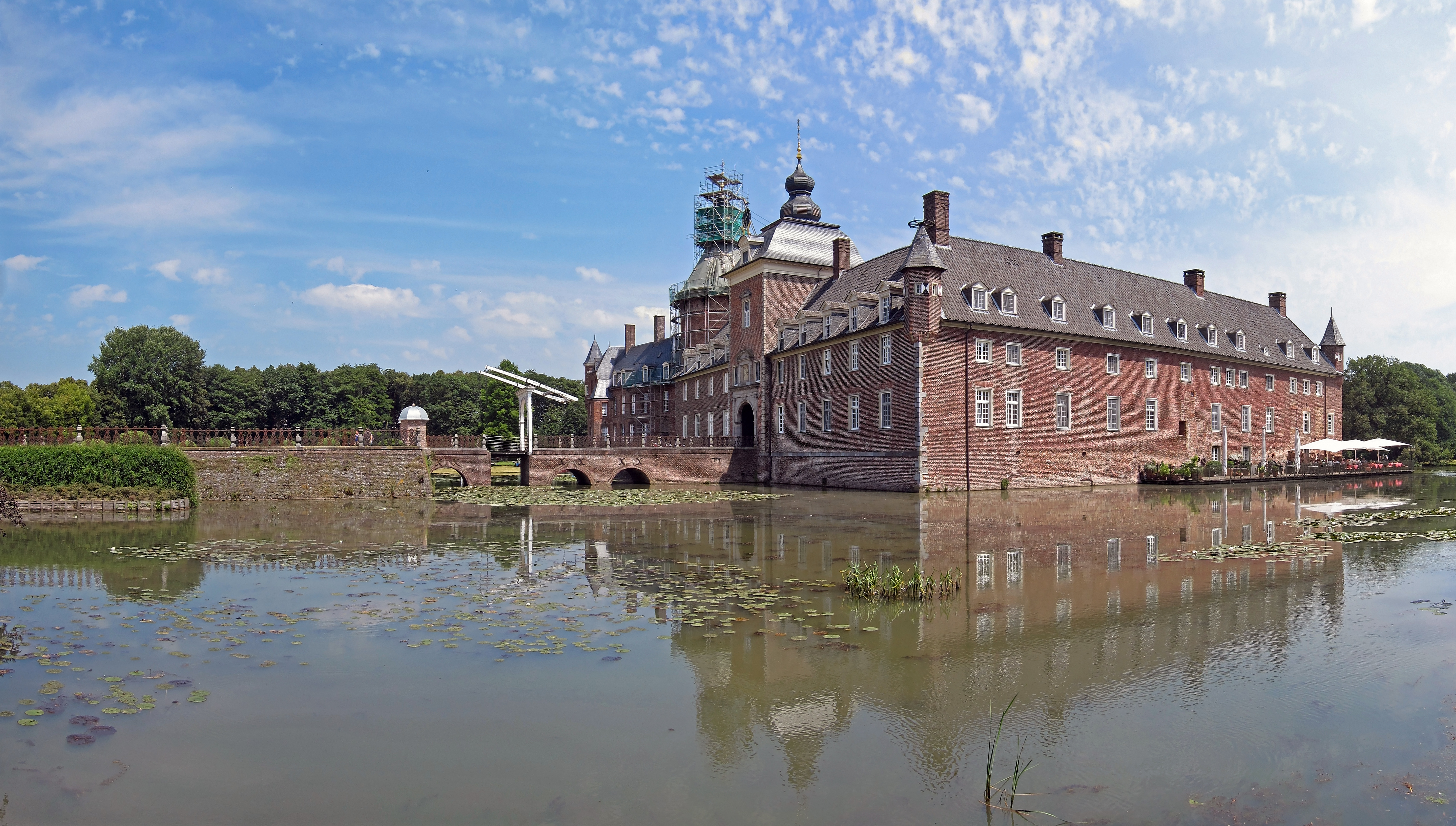 Die Burg Anholt liegt in Nordrhein-Westfalen bei Anholt, einem Stadtteil von Isselburg. Die Anlage gehört zu den größten Wasserschlössern des Münsterlandes und wurde um 1700 erbaut. Im Zweiten Weltkrieg wurde das Schloss zu 70 Prozent zerstört und in den 1960er Jahren wieder aufgebaut.